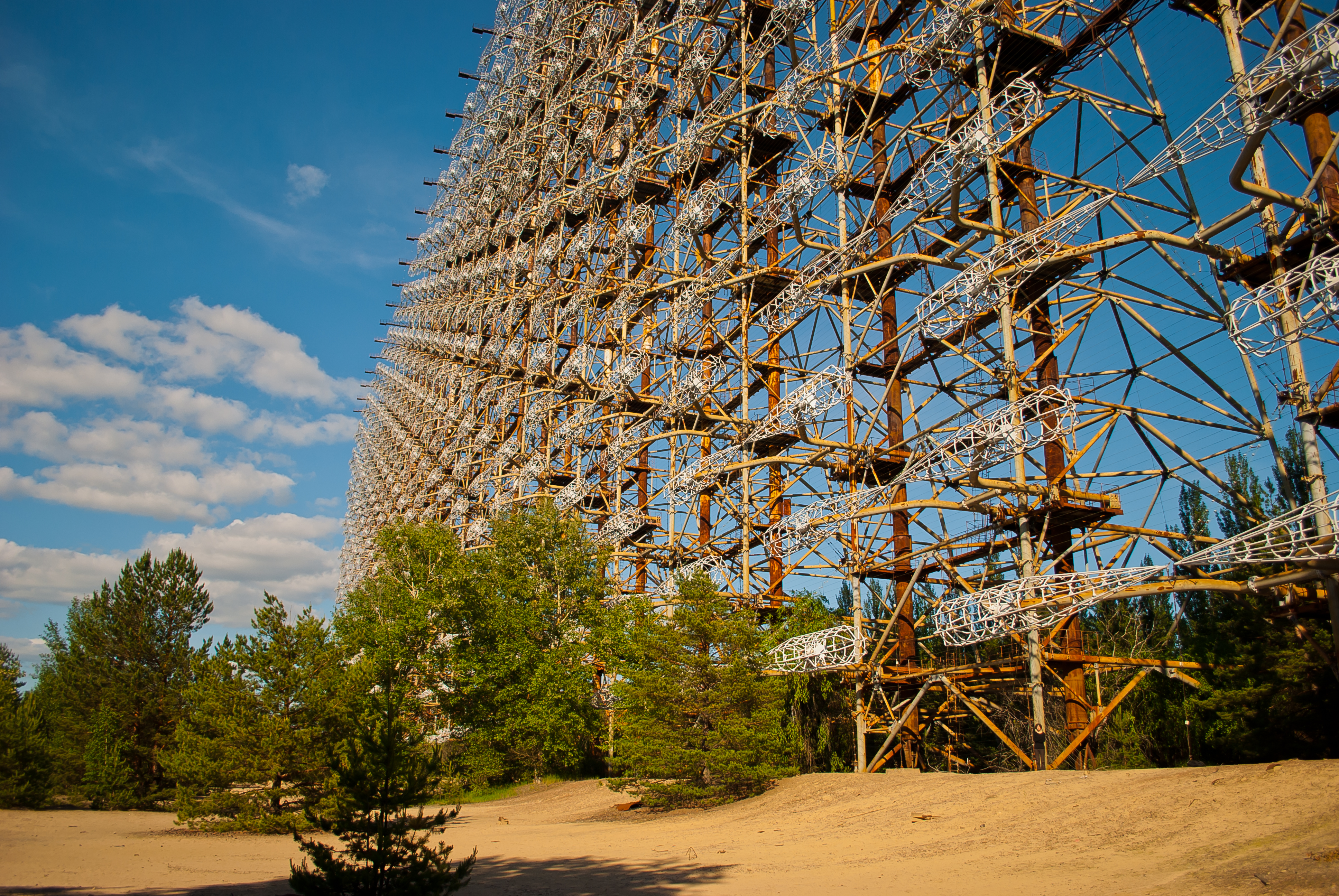 Чорнобильський радіаційно-екологічний біосферний заповідник, Іванківський район, Поліський район, в межах зони відчуження і зони безумовного (обов'язкового) відселення території, що зазнала радіоактивного забруднення внаслідок Чорнобильської катастрофи